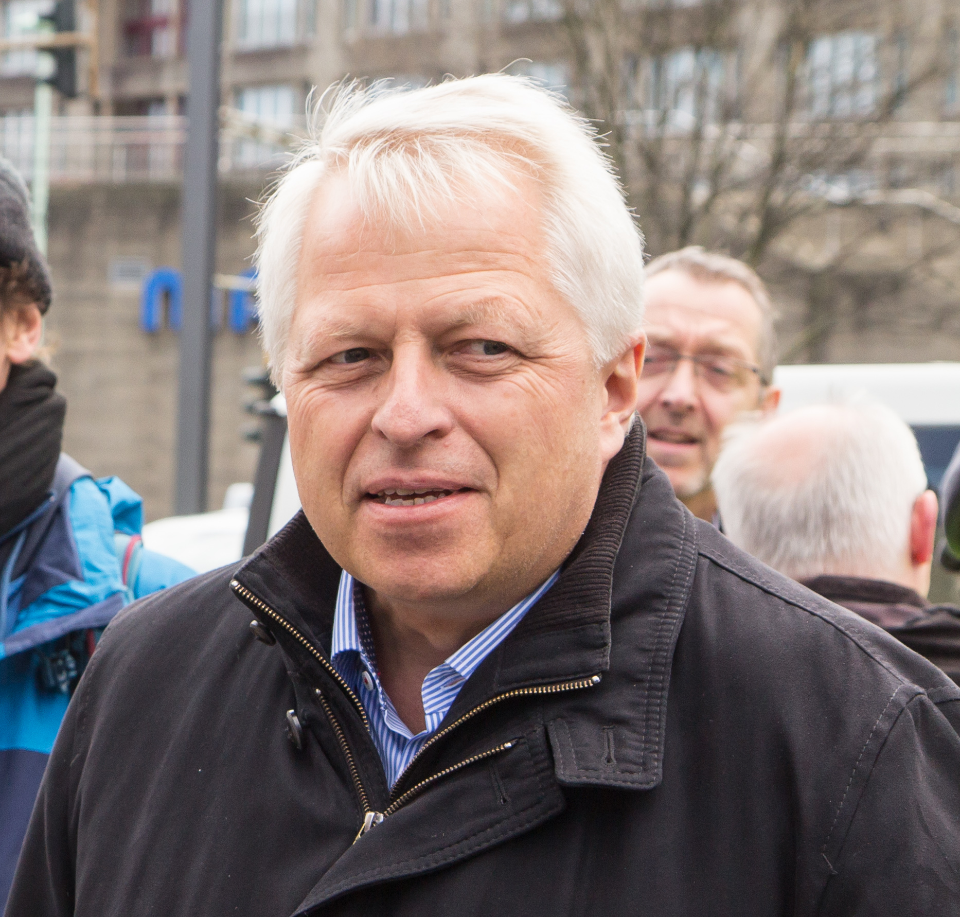 Jürgen Mathies, Kölner Polizeipräsident, in Köln, anlässlich „Tanz die AfD – Gemeinsam für Weltoffenheit, Toleranz und Solidarität“ Gemeinsame Demonstration von 81 Organisationen und Gruppen gegen den AfD-Parteitag in Köln 2017